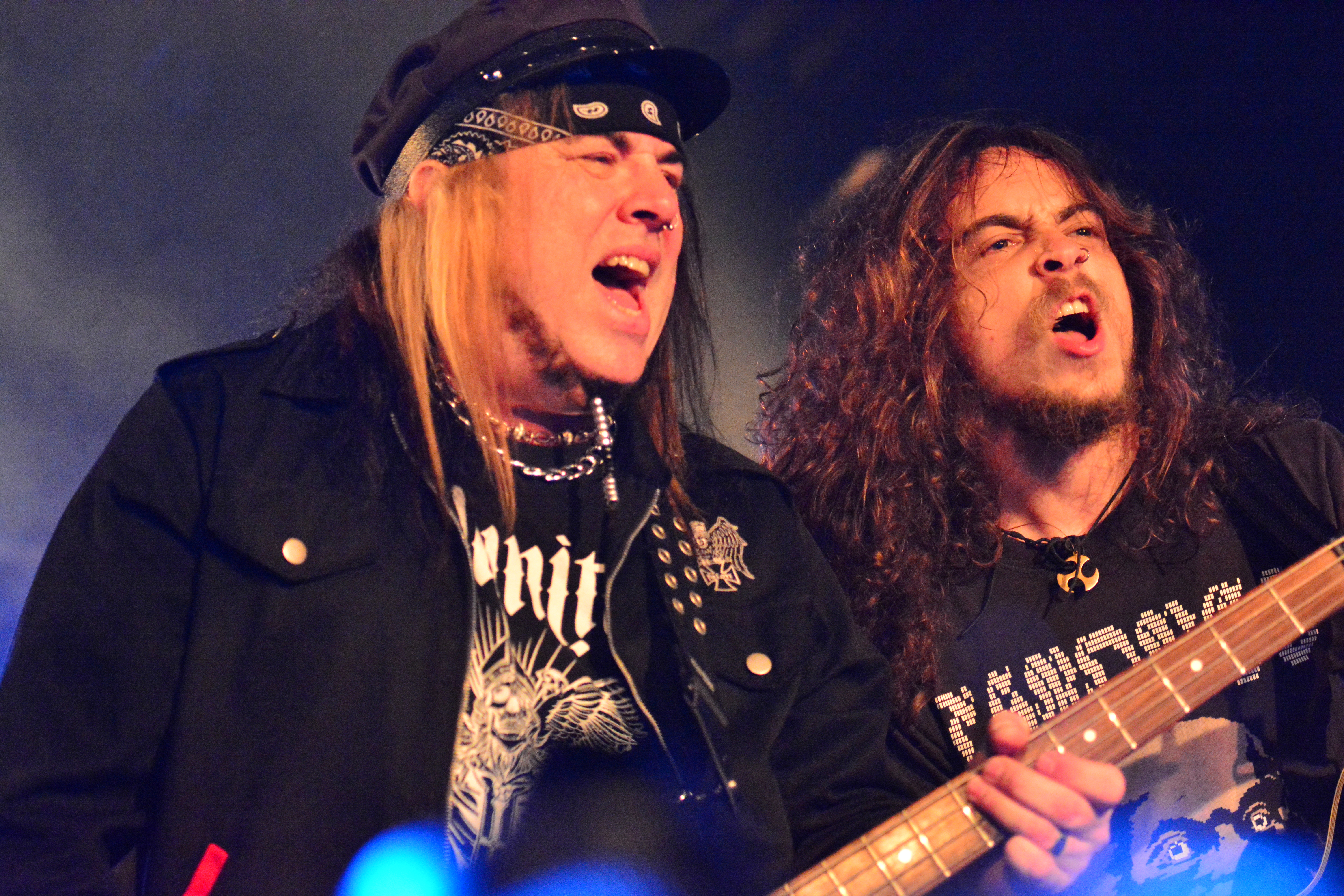 Riot V beim Headbangers Open Air 2014